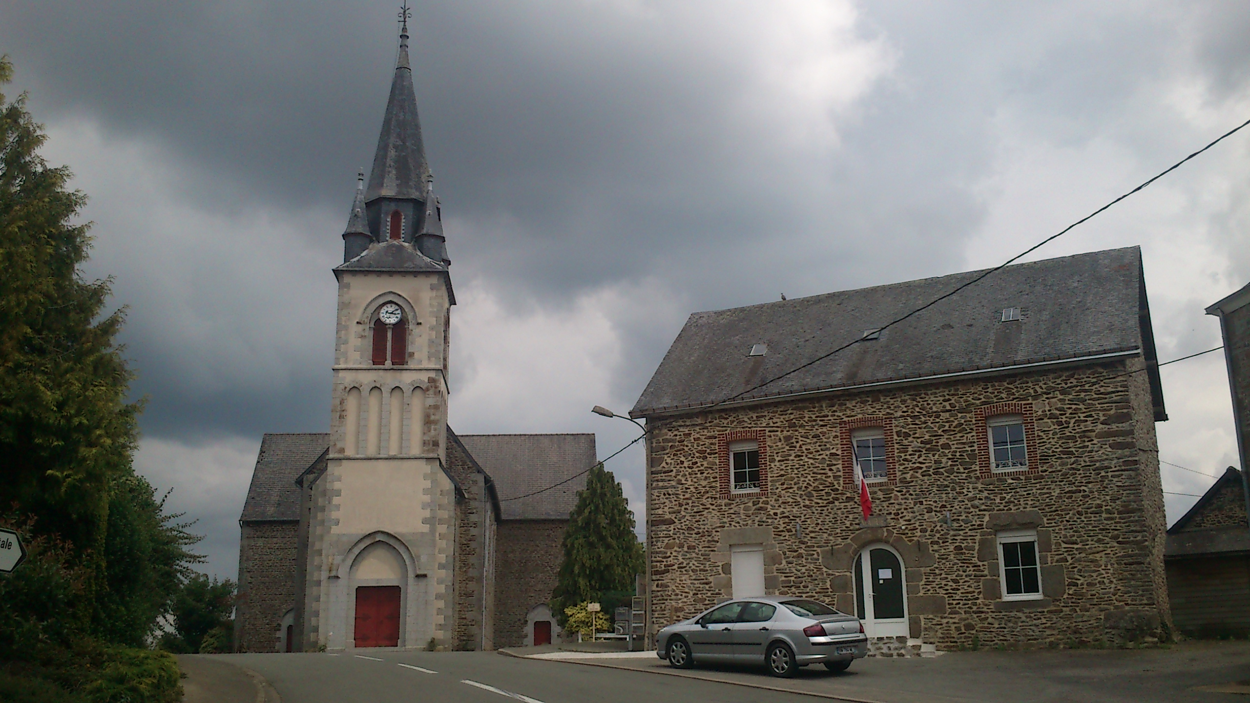 La Haie Traversaine Eglise et Mairie